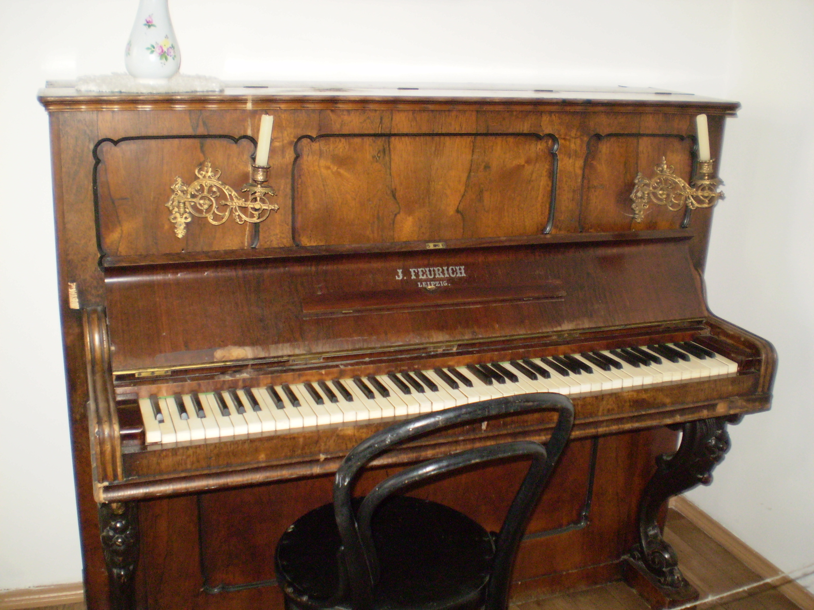 Германское пианино компании Feurich Klavier- und Flügelfabrikation. Музей истории города Улан-Удэ